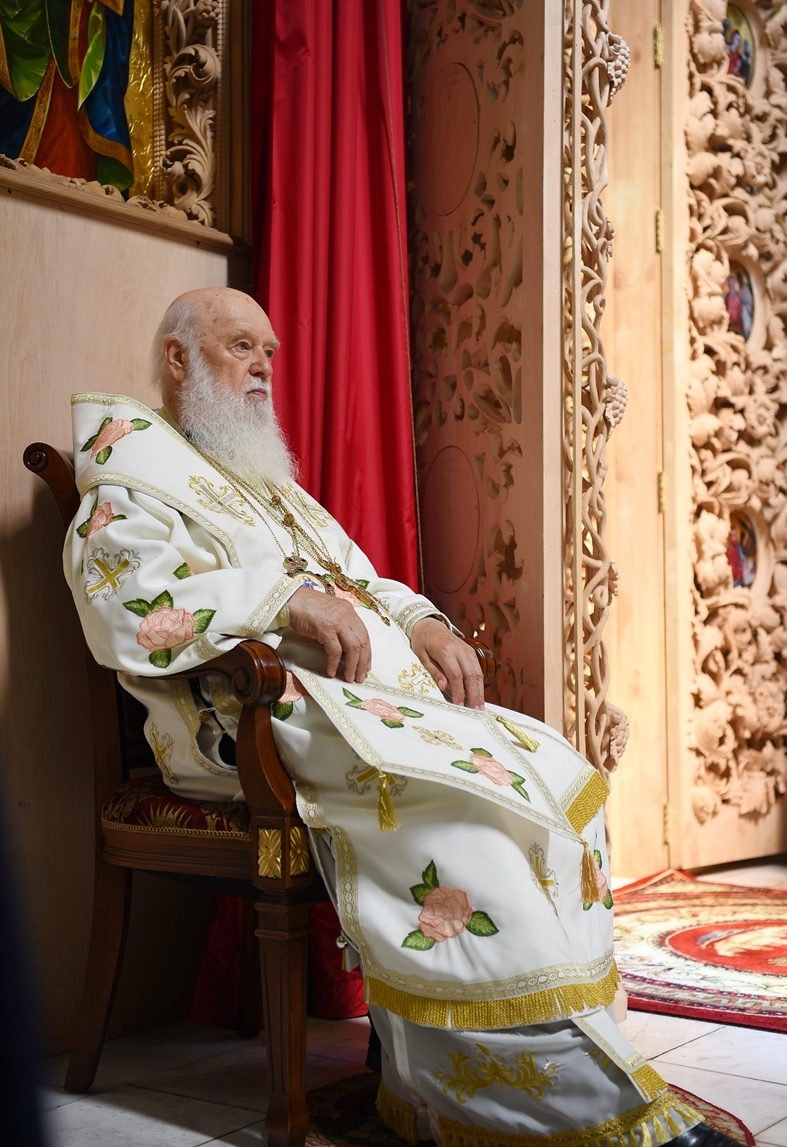 Патріарх Філарет під час Літургії у Видубицькому монастирі на свято Марії Магдалини 2018